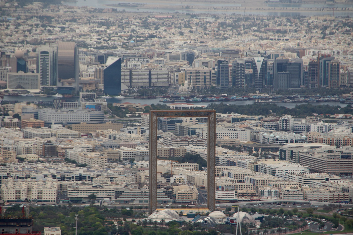 Der Dubai Frame vom Burj Khalifa aus gesehen mit dem Stadtteil Alt-Dubai, dem Dubai Creek und dem Stadtteil Deira dahinter